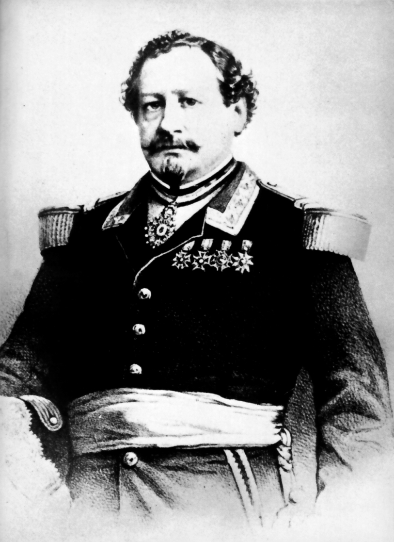 Juan Crisóstomo Torrico (1808 - 1875), militar y político peruano. Autoproclamado Jefe Supremo durante un breve periodo en 1842.